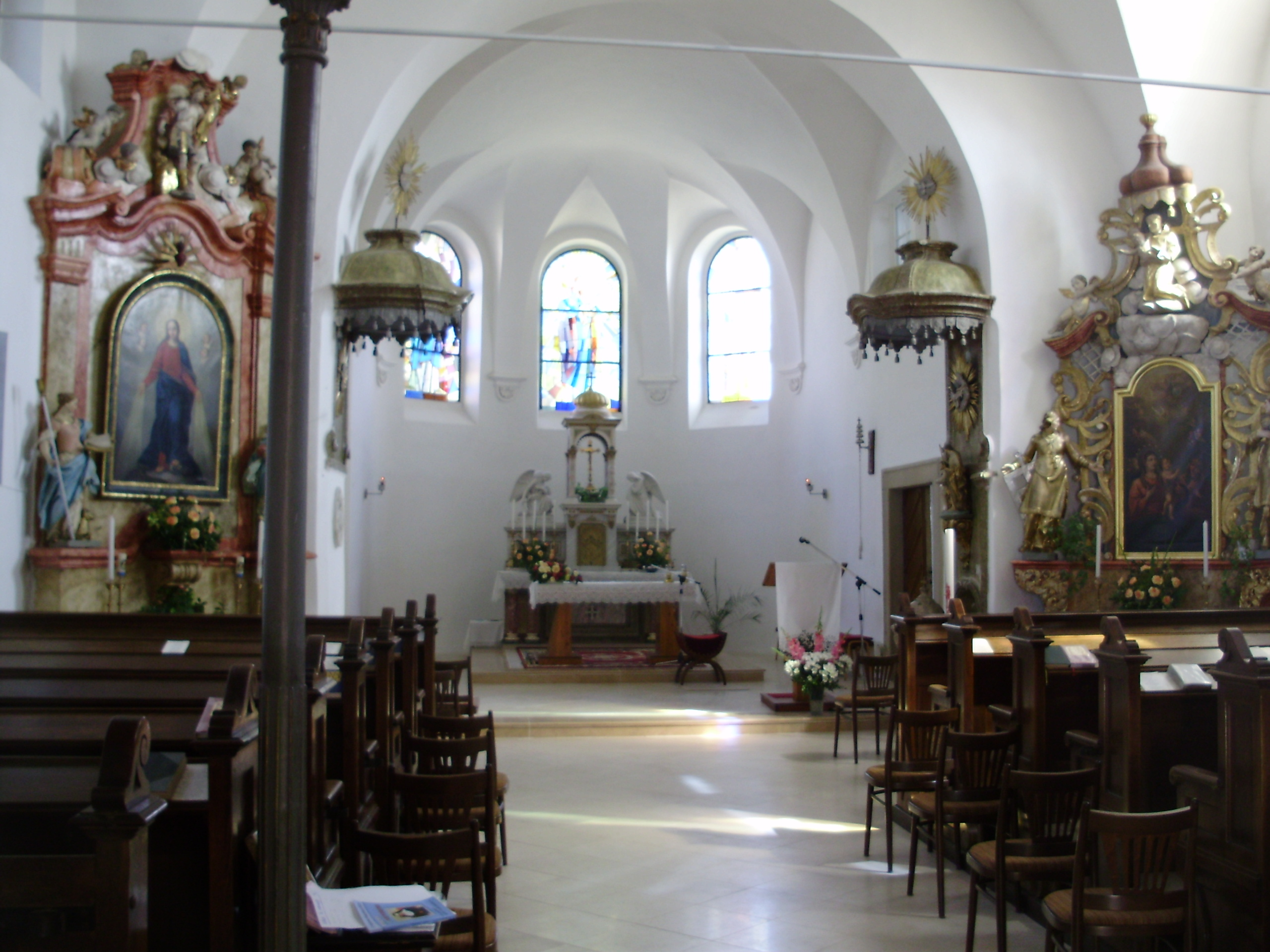 Interiér kostela v Drnovicích (Vyškov District, Czech Republic)